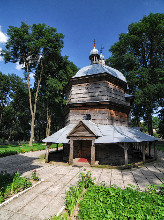 Церква Св.Миколи